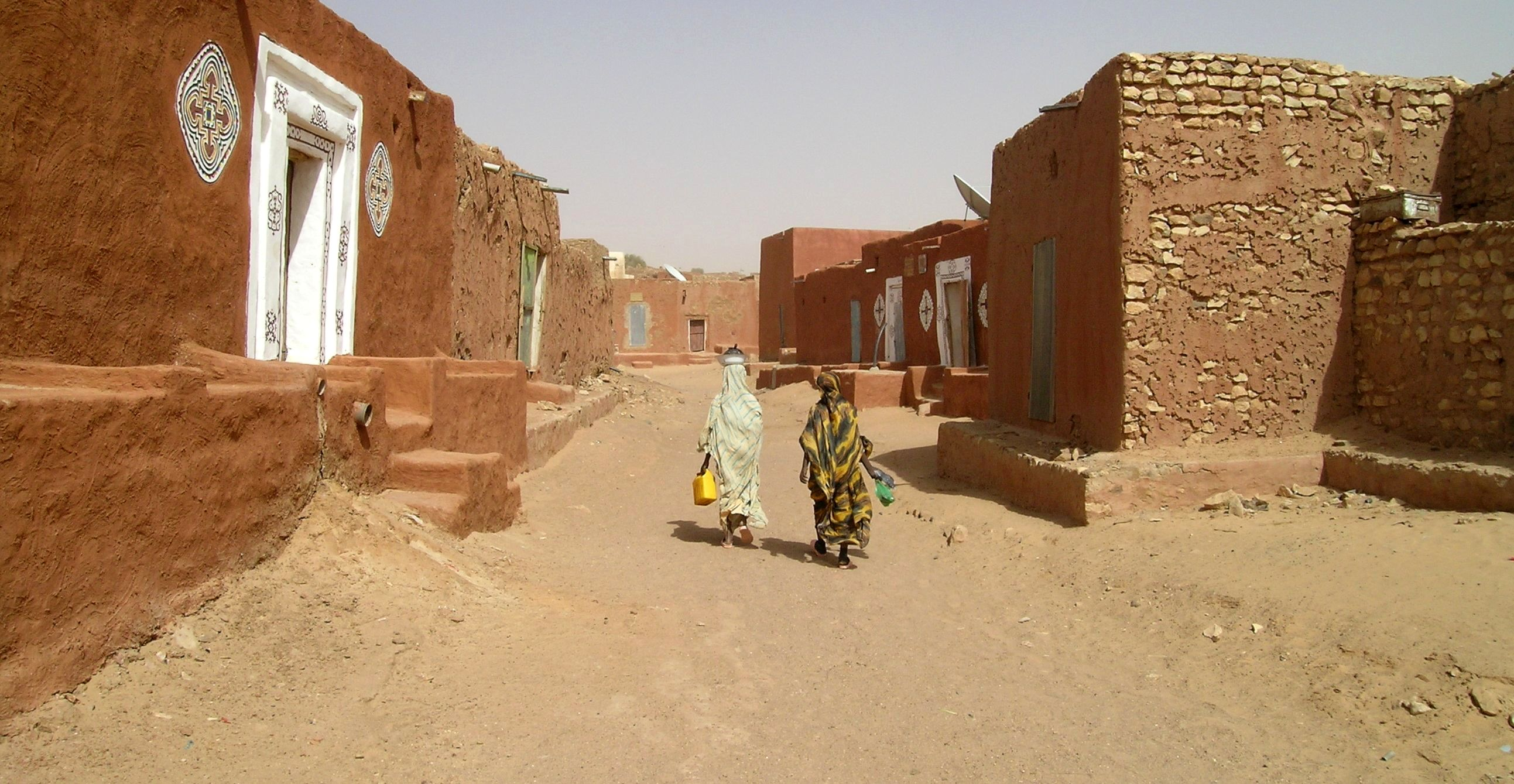 A street in Oualata, Mauritania